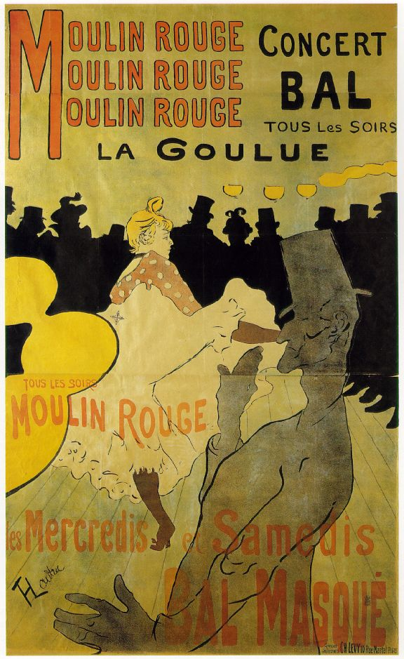 Moulin-Rouge-Plakat von Henri de Toulouse-Lautrec